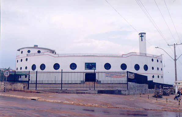 Igreja católica da região administrativa de Samambaia, Distrito Federal, Brasil